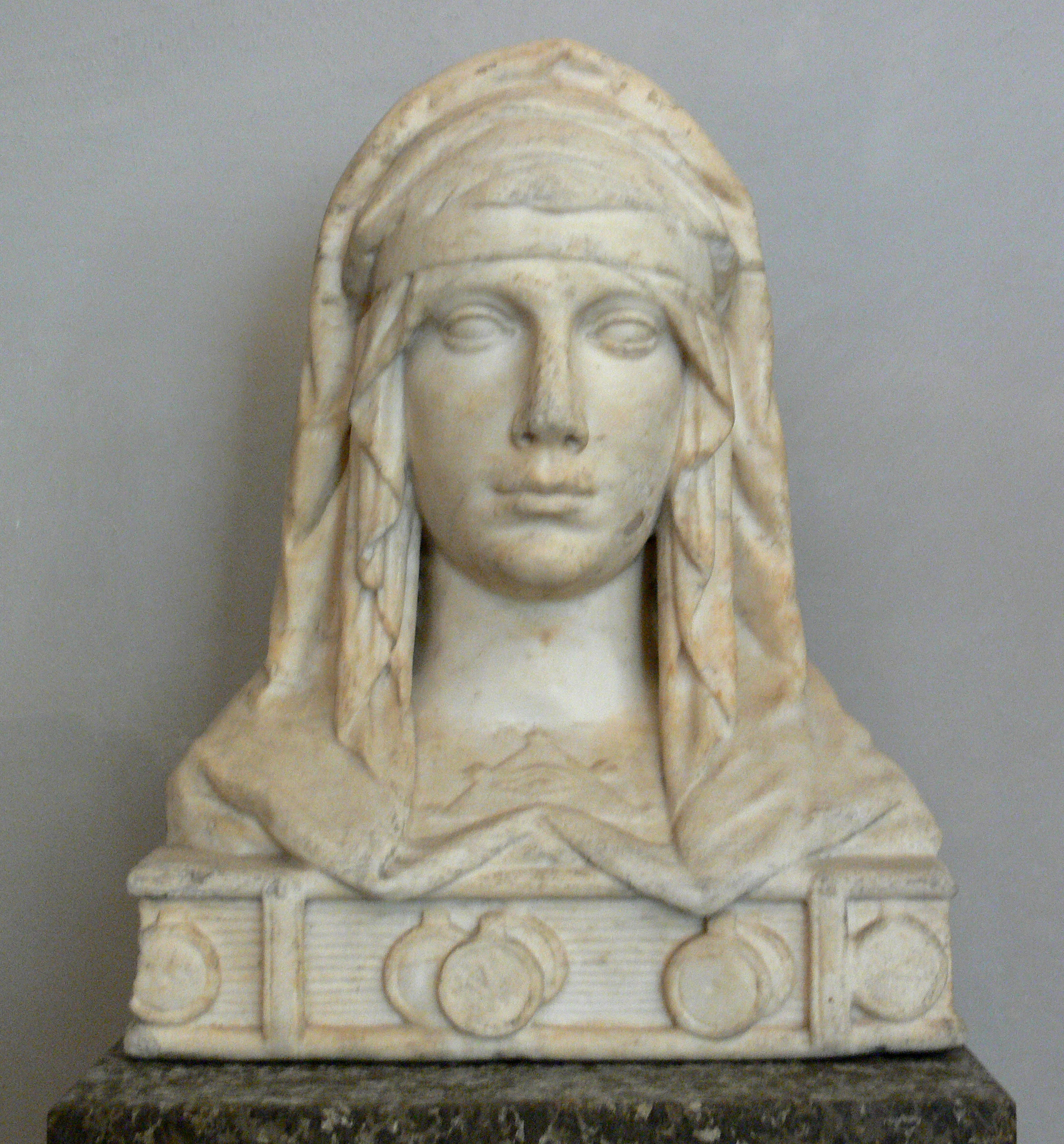 Der Glaube, vom Familiengrab des Bildhauers Johann Baptist Straub (Messerschmidts Onkel) am Grabmal der zweiten Ehefrau Straubs; Marmor Bayerisches Nationalmuseum München, übernommen vom alten südlichen Friedhof München 1908, Inv. R8726